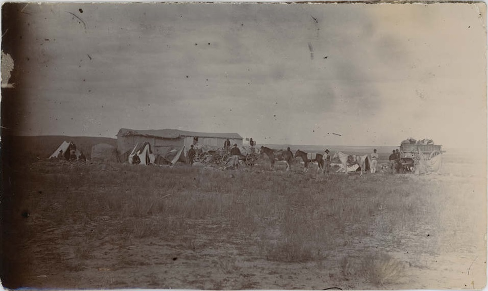 El Campamento Villegas fue bautizado así por el Colonel Villegas, un oficial que desempeñó un papel clave en la campaña militar del gobierno argentino contra los indios nativos al principio de la década de 1880. Fotografía realizada por John Murray Thomas (1847-1924).